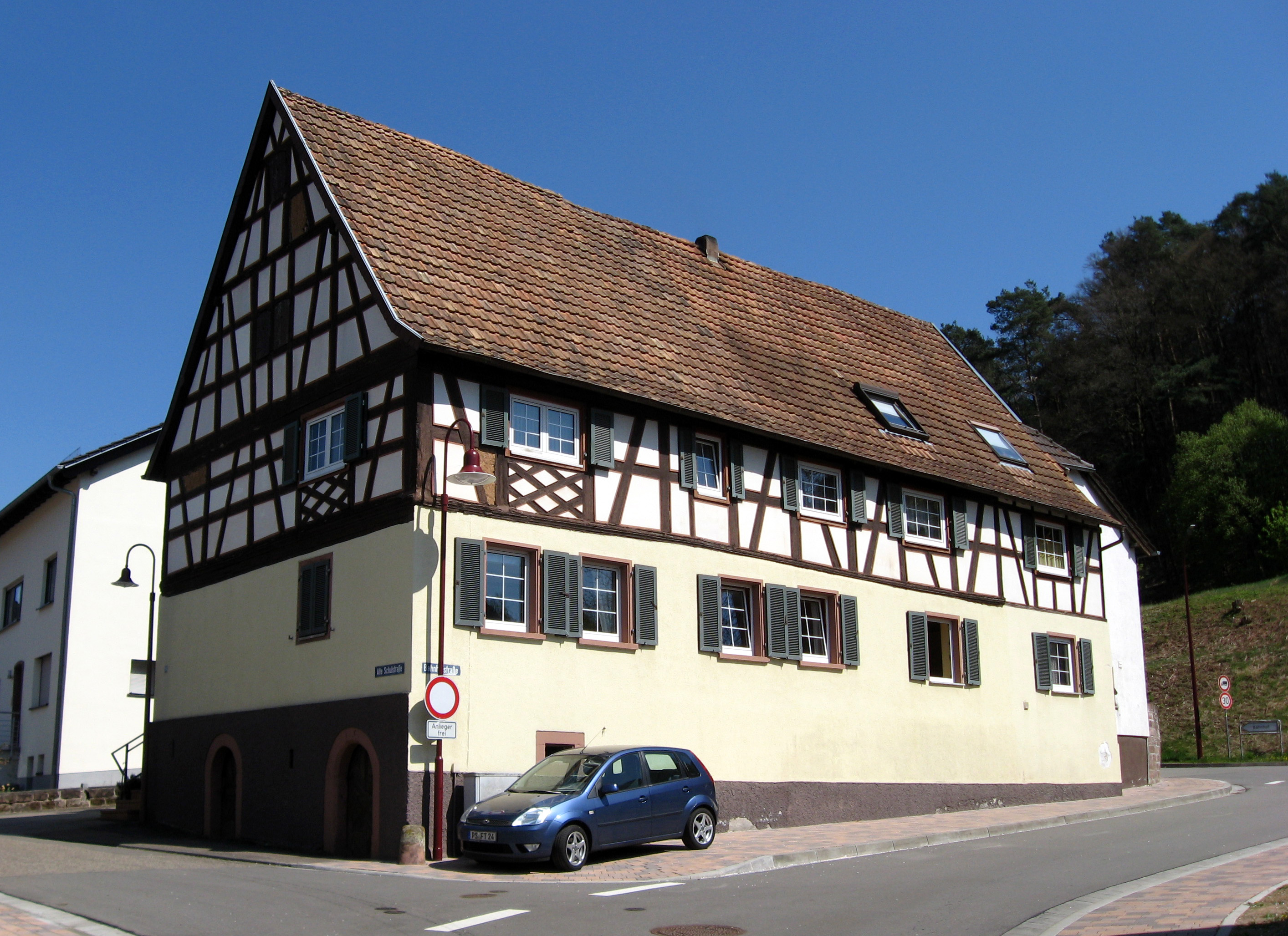 Fachwerkhaus Alte Schulstraße 9 in Wilgartswiesen